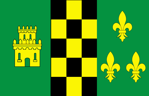 Bandeira de Ordes, A Coruña Galiza Spain